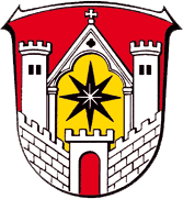 Wappen von Diemelstadt